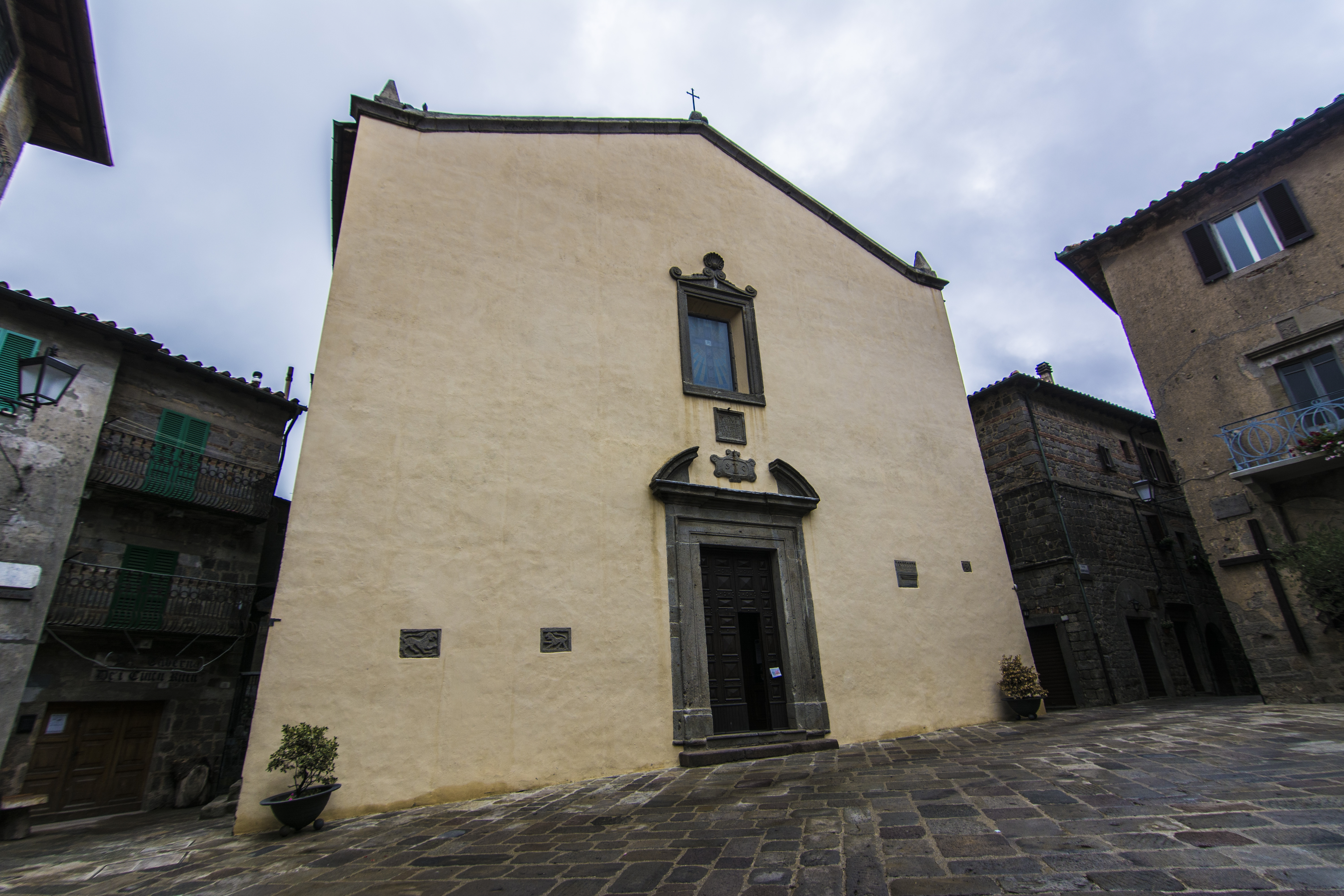 Chiesa di Santa Croce This is a photo of a monument which is part of cultural heritage of Italy.